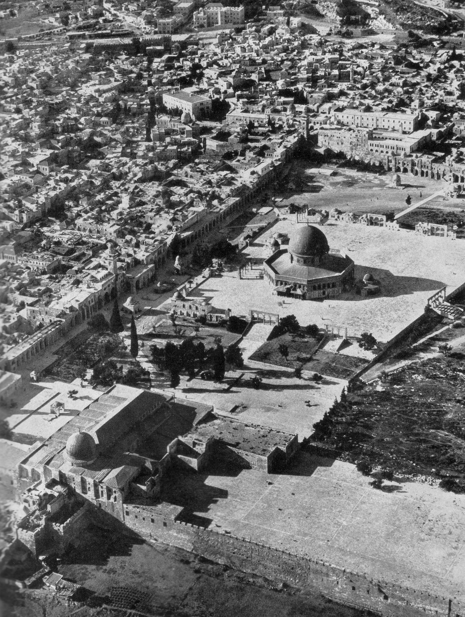 הר הבית, תצלום אווירי 1938